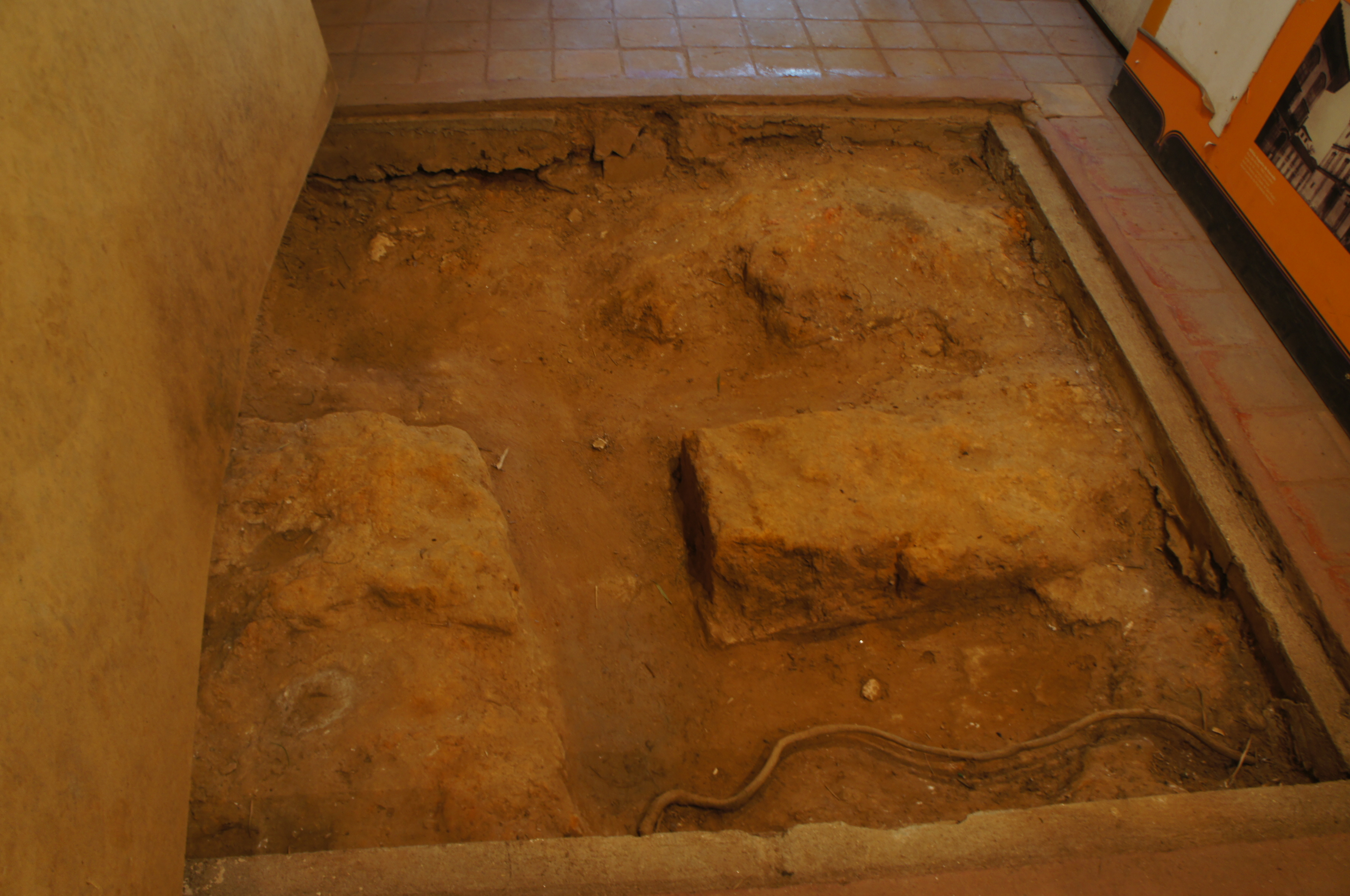 Escavação feita durante restauração da Casa Sítio da Ressaca, em São Paulo (SP), Brasil.